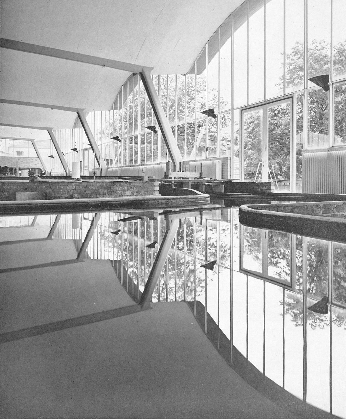 Versuchshalle mit Modellen